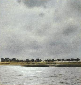 Vilhelm Hammershøi: Gentofte Sø (Gentofte Lake), 1903, Öl auf Leinwand, Privatsammlung